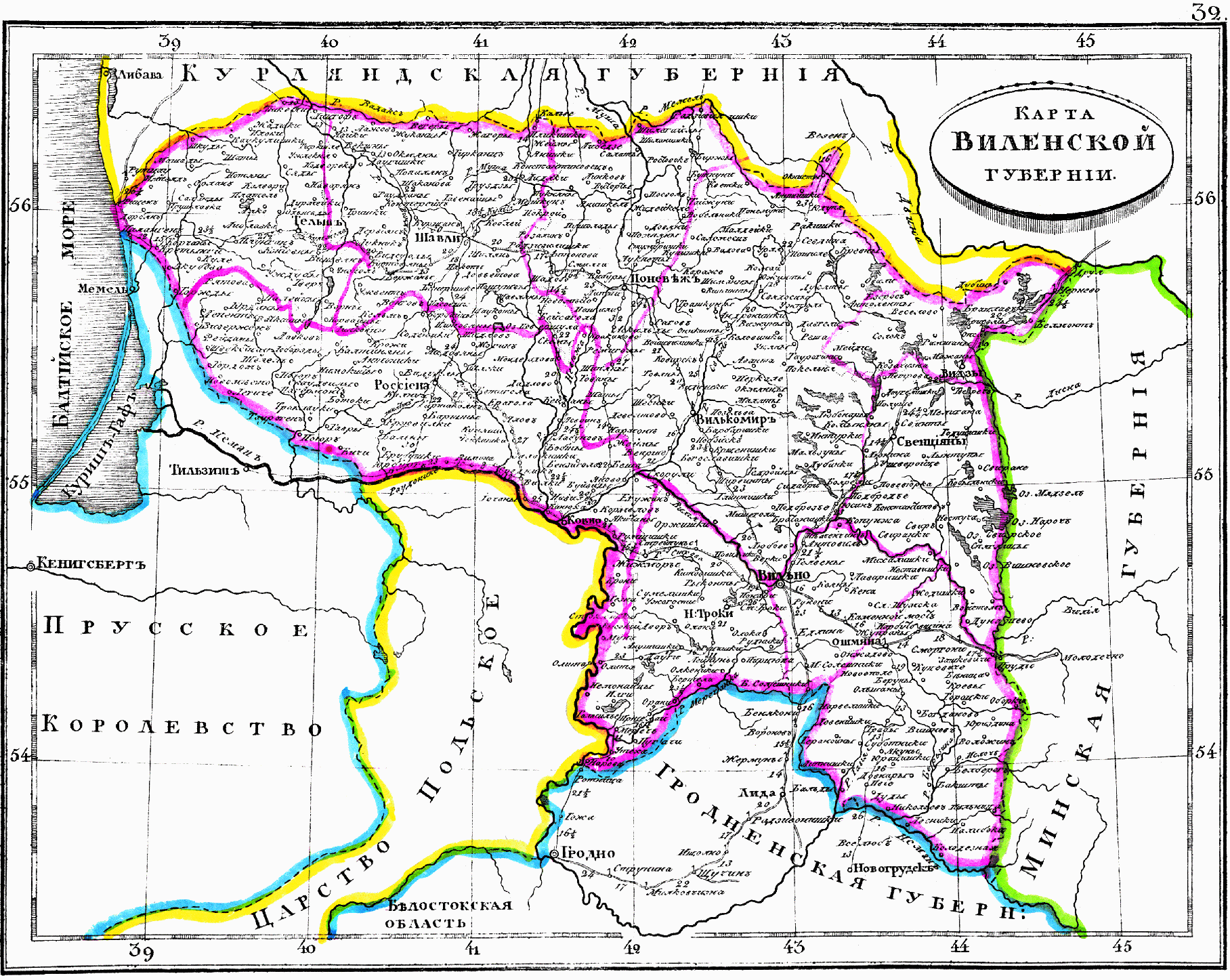 Карта Виленской губернии, 1835